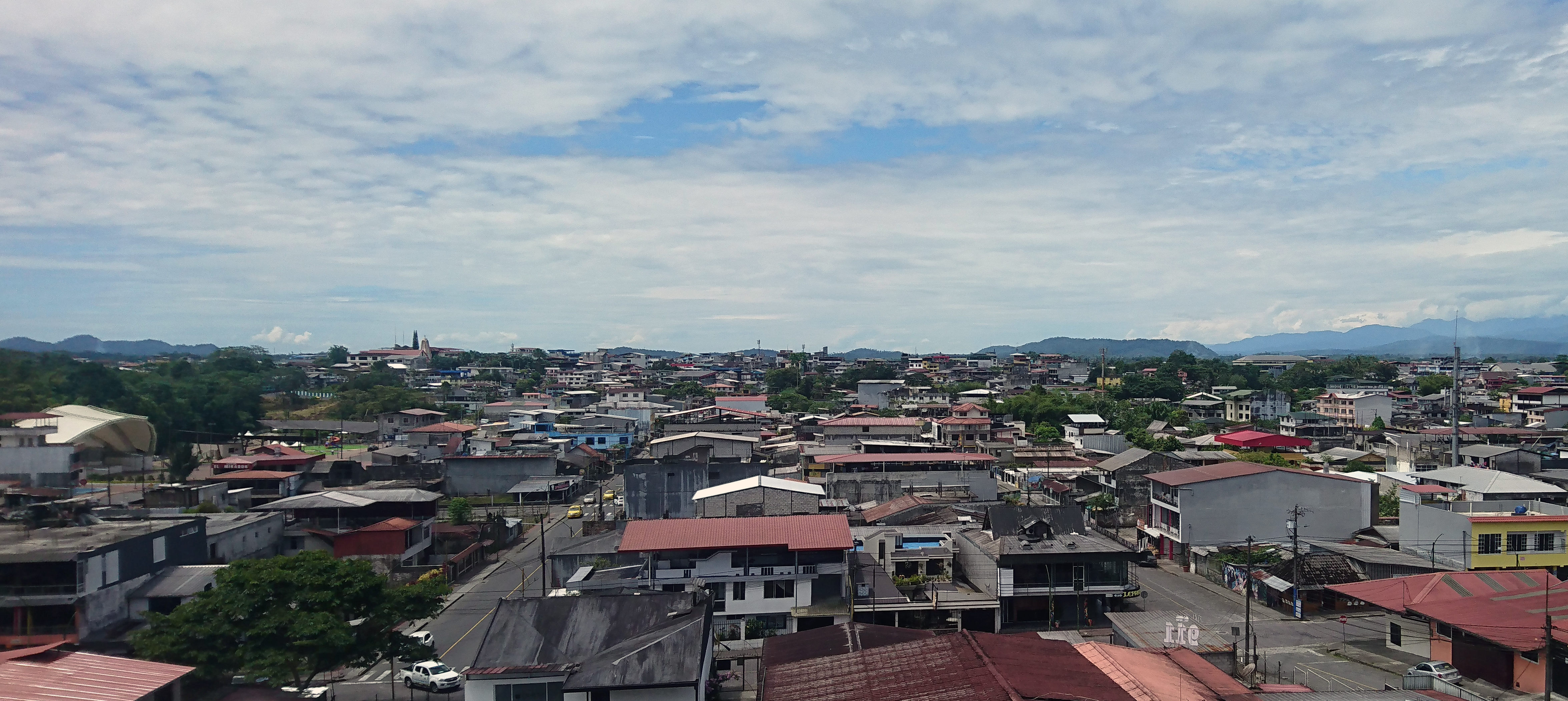 Vista panorámica del Puyo